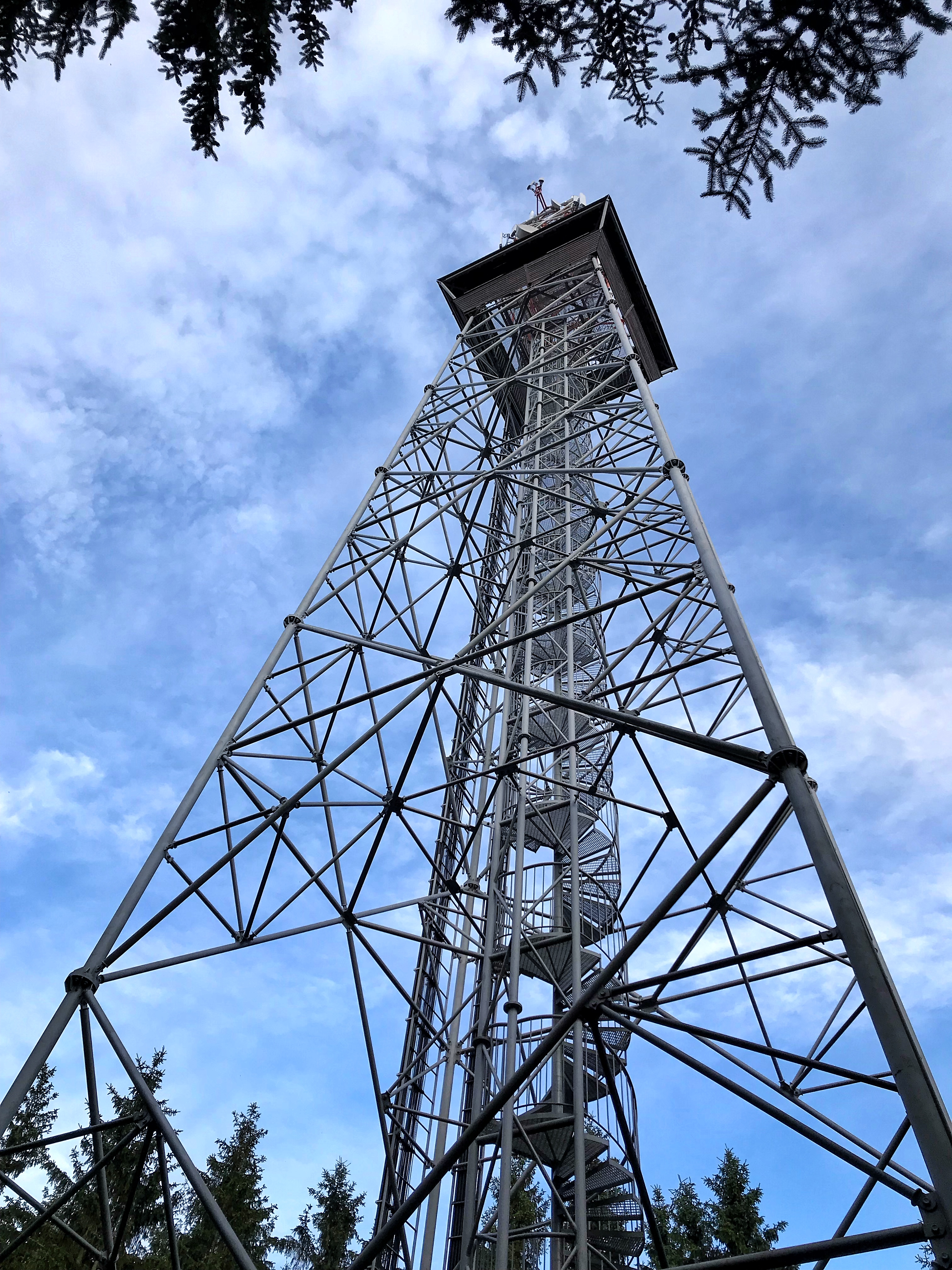 Rozhledna Horní les, 59 metrů, vyhlídková plošina ve 38 metrech, 201 schodů.